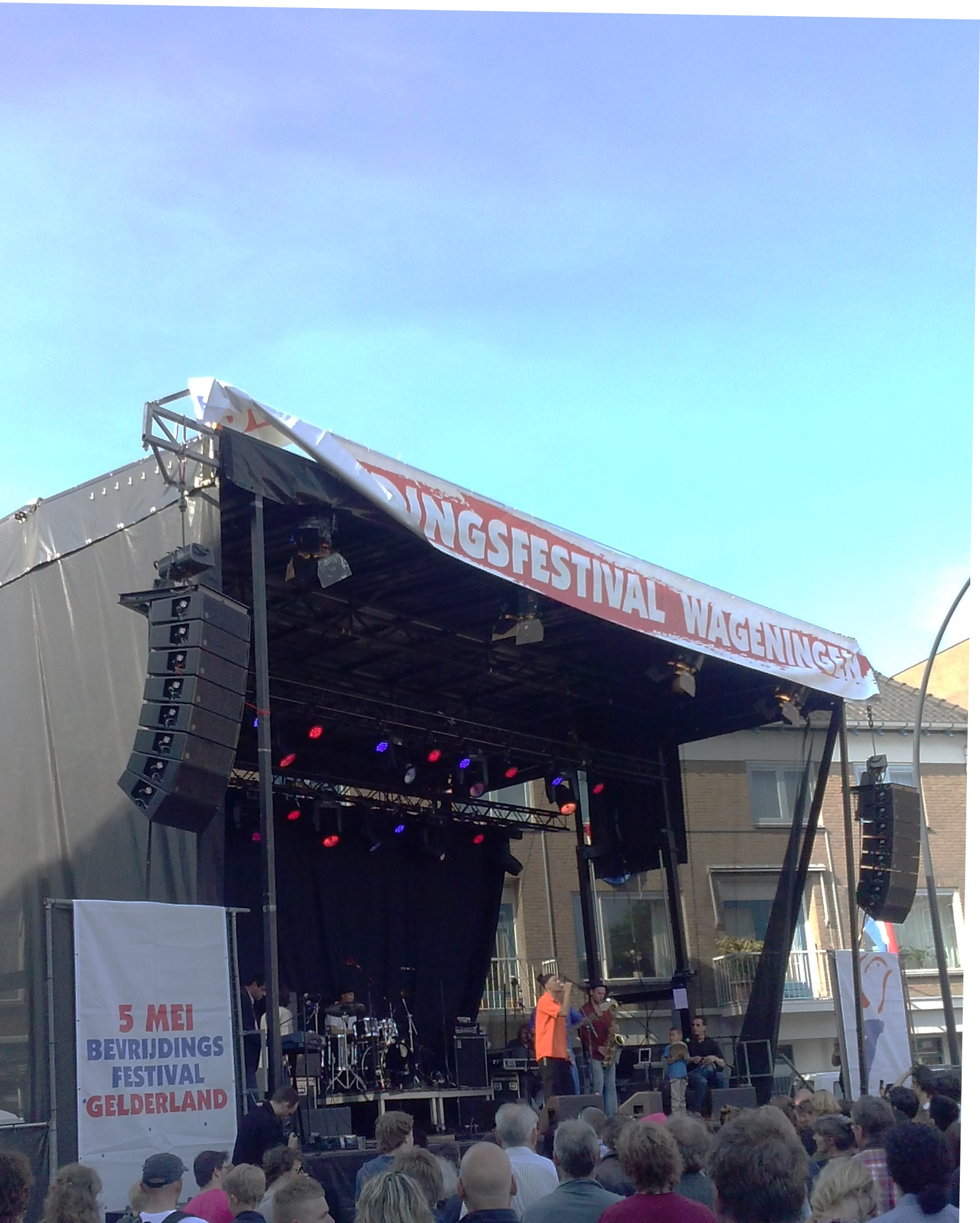 Bevrijdingsfestival Wageningen 2014, Salvedaplein. Nederlands-Marokkaanse muziekgroep Kasba